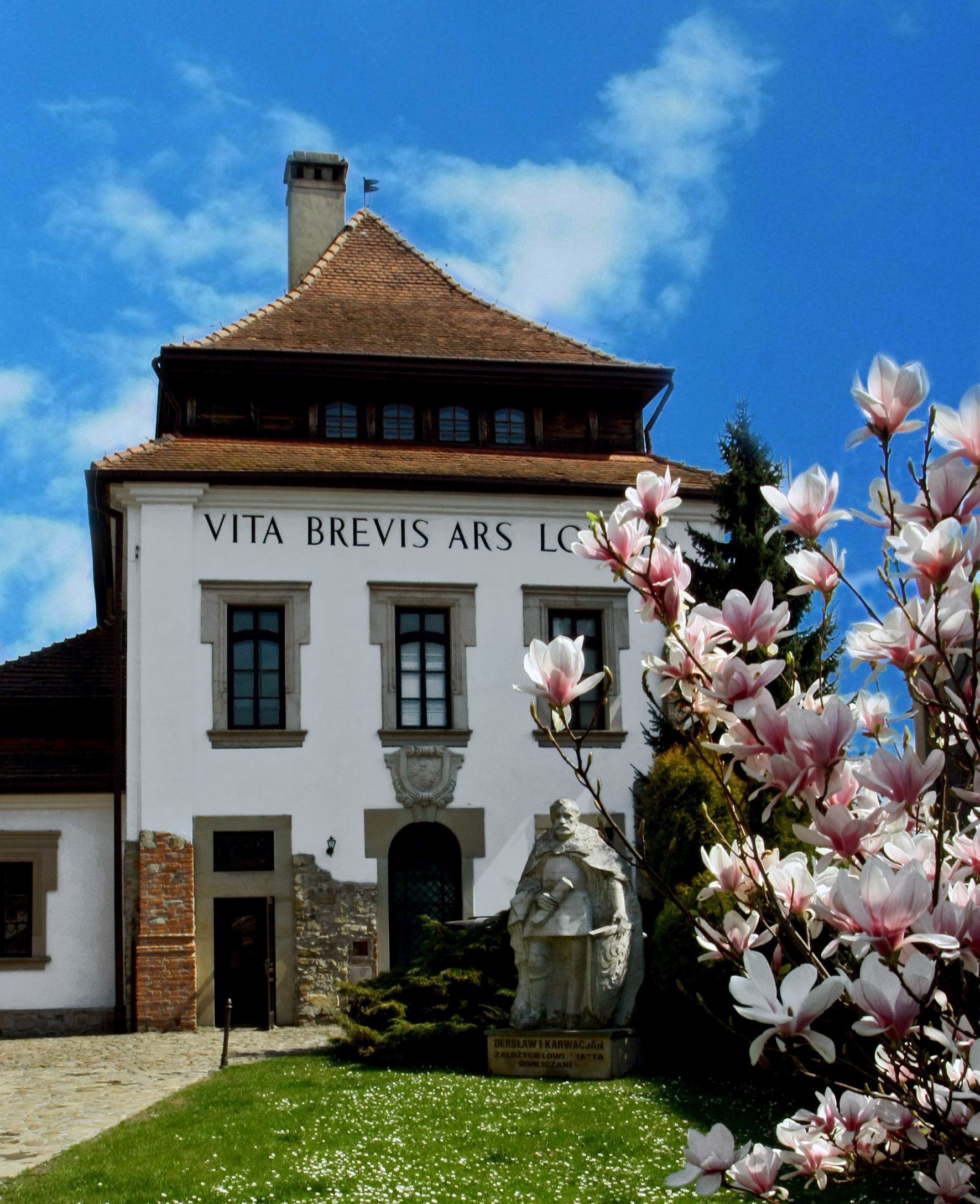 Dwór Karwacjanów